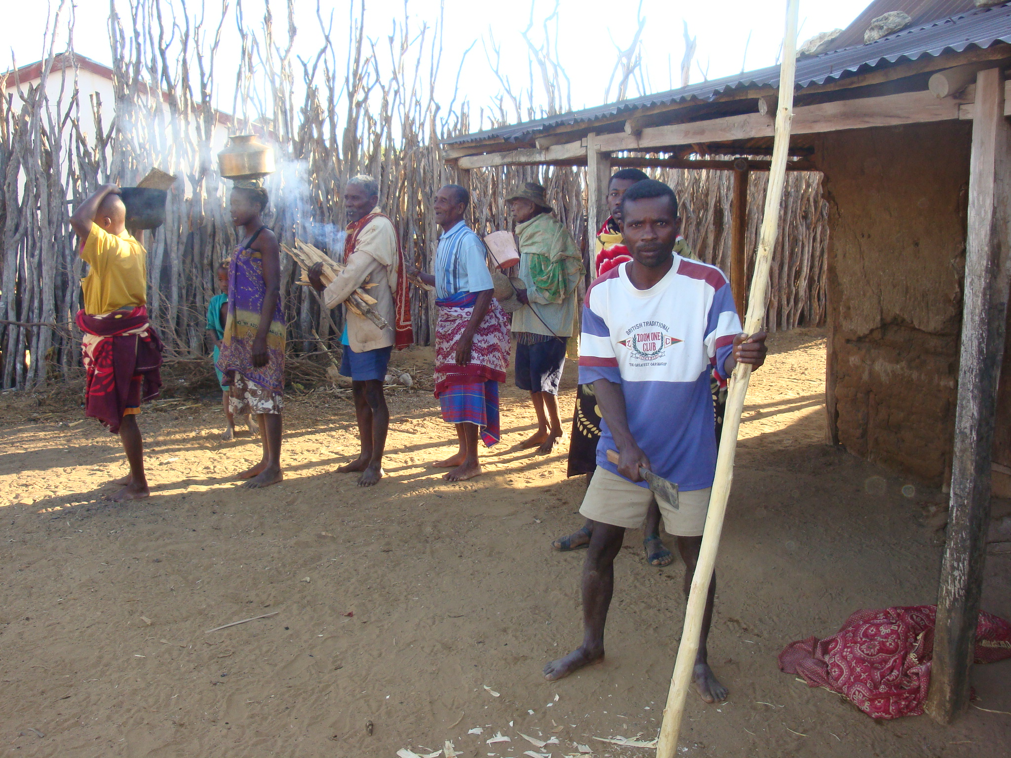 Procession lors de la reconnaissance de l'enfant. Transport du feu, de l'eau et des outils vers le Manguier Sacré.